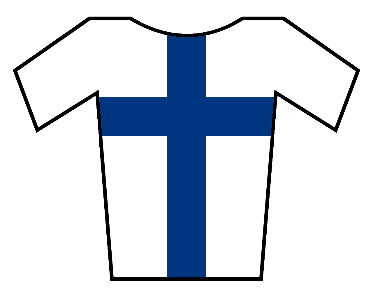 Maillot de Finlandia